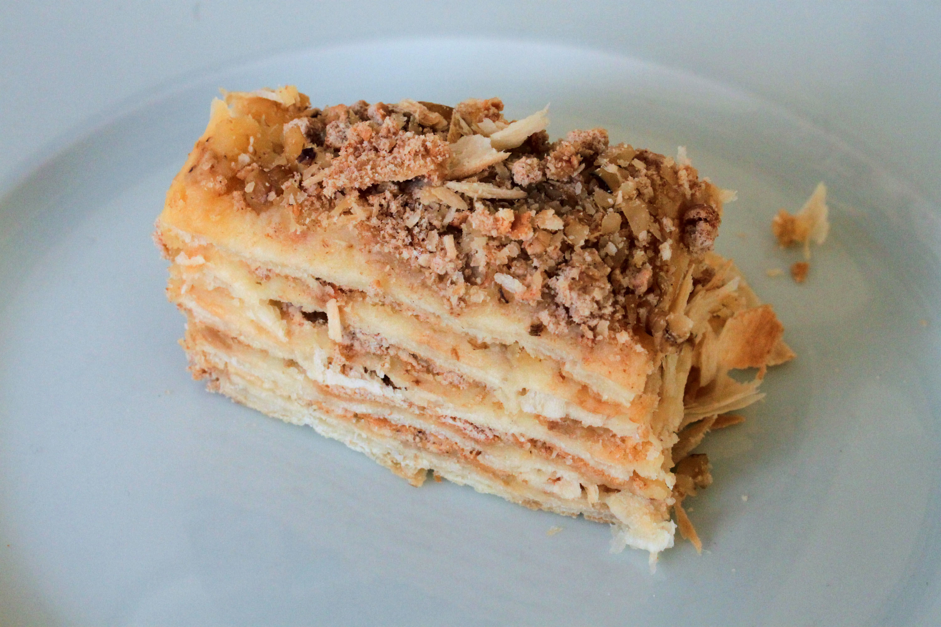 Napoleonschnitte, Blätterteig mit Buttercreme (Fabrikation Delmenhorst)